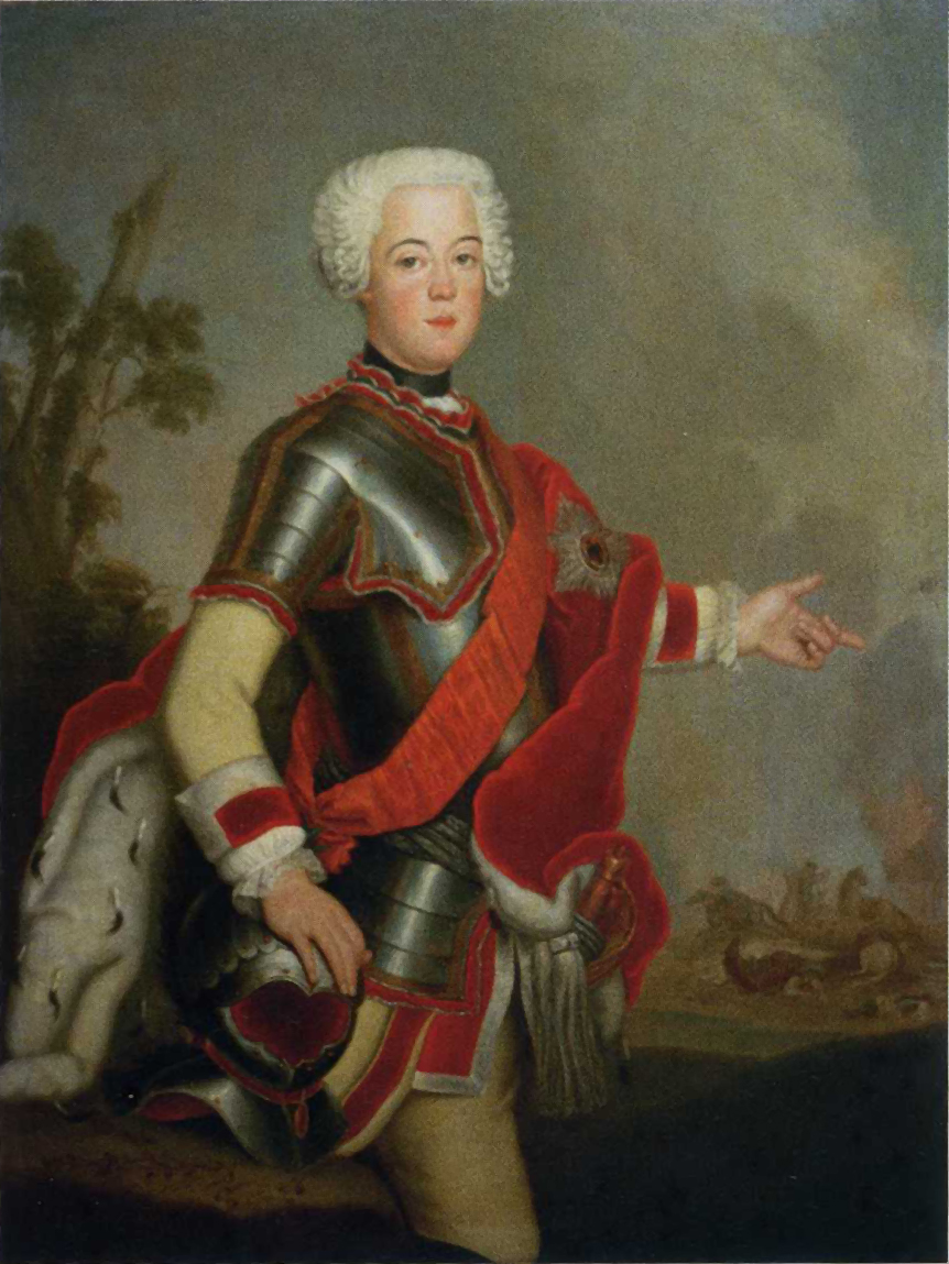 Prinz August Wilhelm von Preußen. Öl auf Leinwand (Kopie), 94 x 140 cm. Stiftung Preußische Schlösser und Gärten, GK I 2770